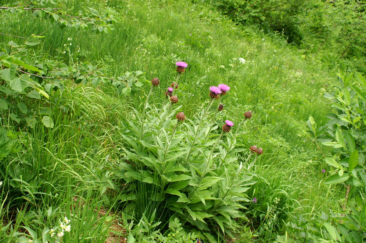 Rapontika na Mokrici.